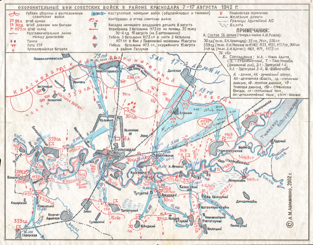 Схема оборонительных боев в районе Краснодара 7 - 17 августа 1942 года